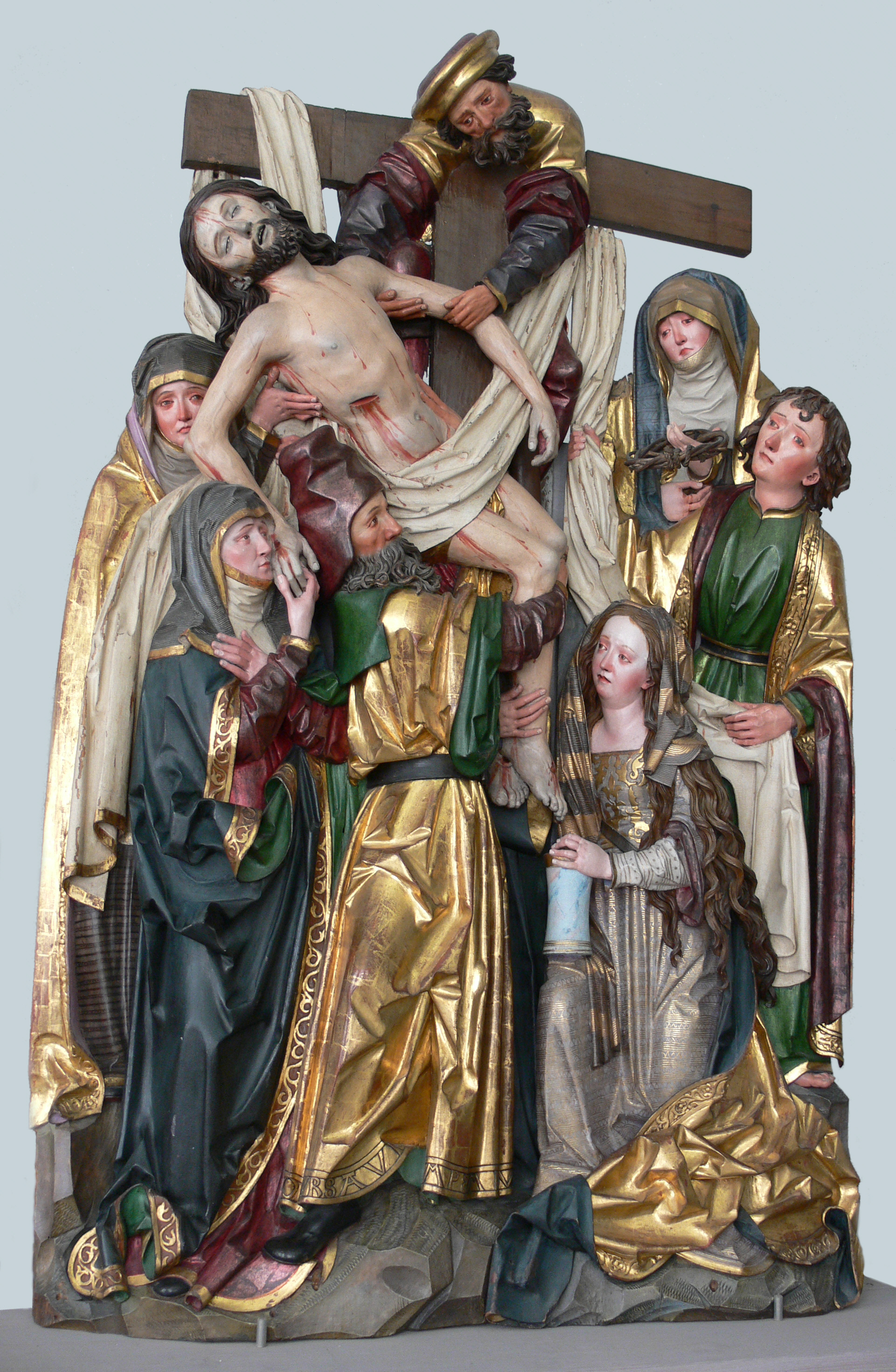 Niklaus Weckmann (Werkstatt): Kreuzabnahme, Ulm um 1520 (aus Kloster Zwiefalten) Landesmuseum Württemberg, Stuttgart